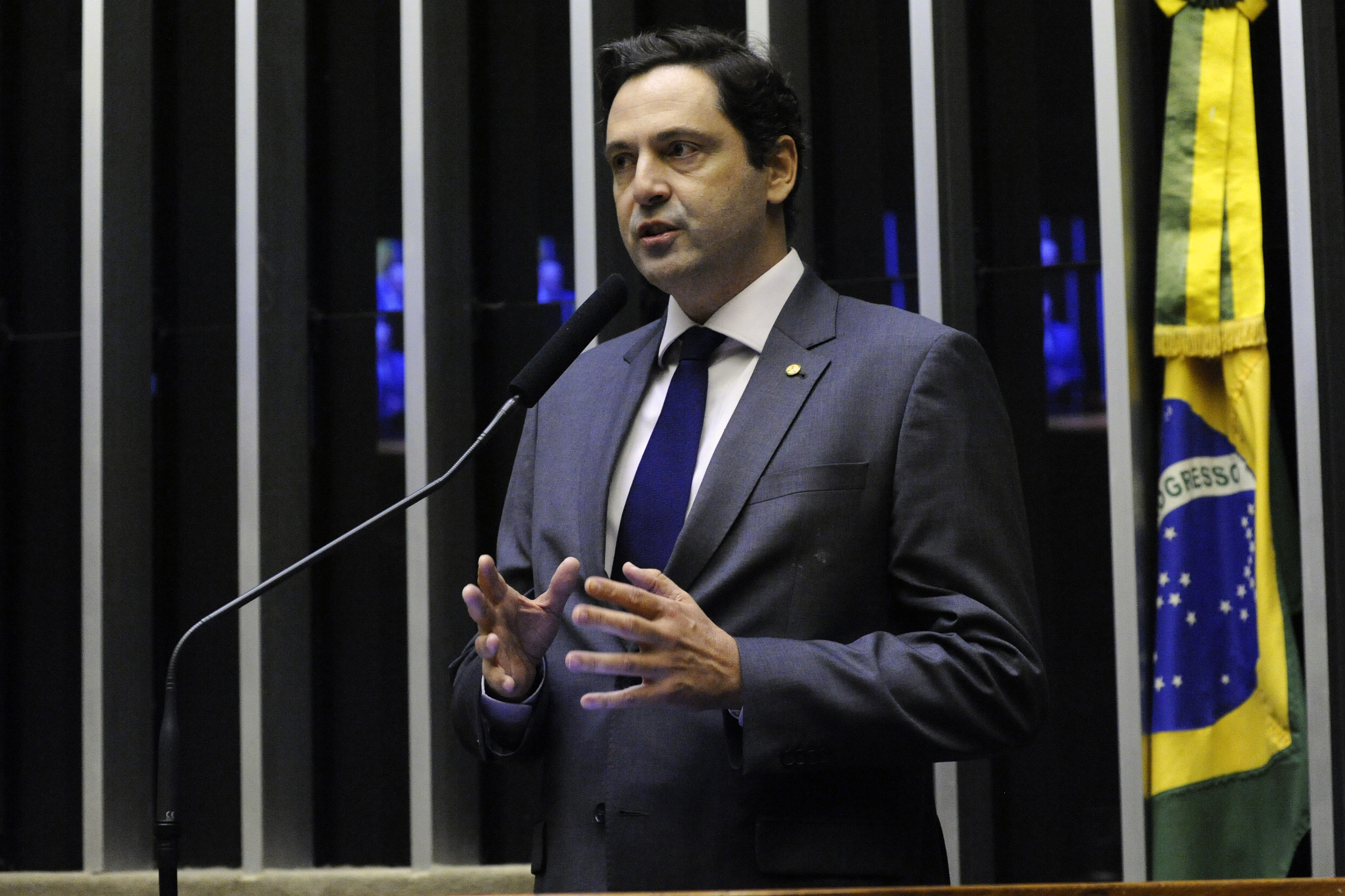 Plenário - Sessão Solene - 13/03/2019: Cerimônia Pelo Brasil e contra a Corrupção. Dep. Luiz Philippe de Orleans e Bragança (PSL - SP)